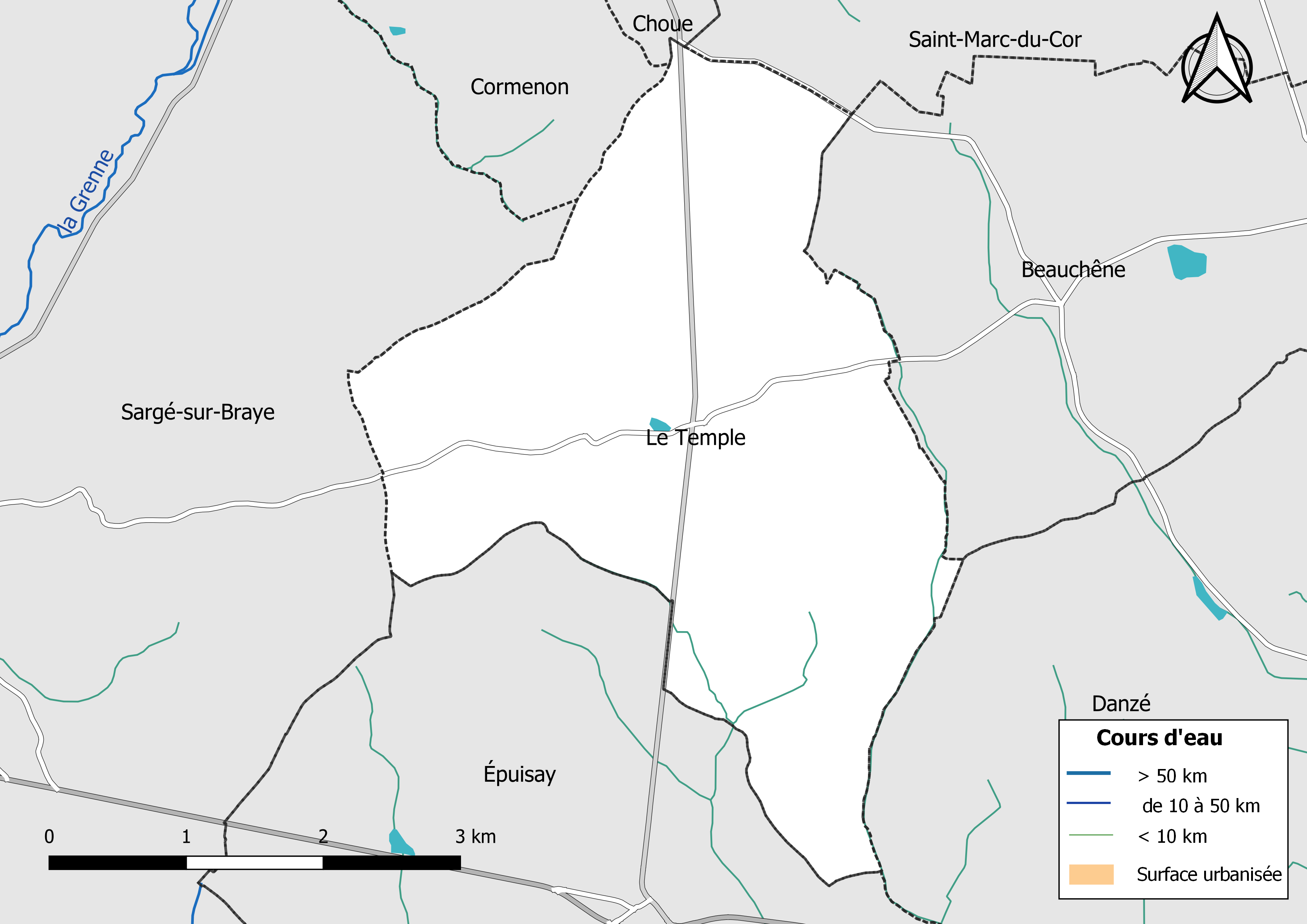 Carte du réseau hydrographique de la commune de Le Temple (Loir-et-Cher) (France).